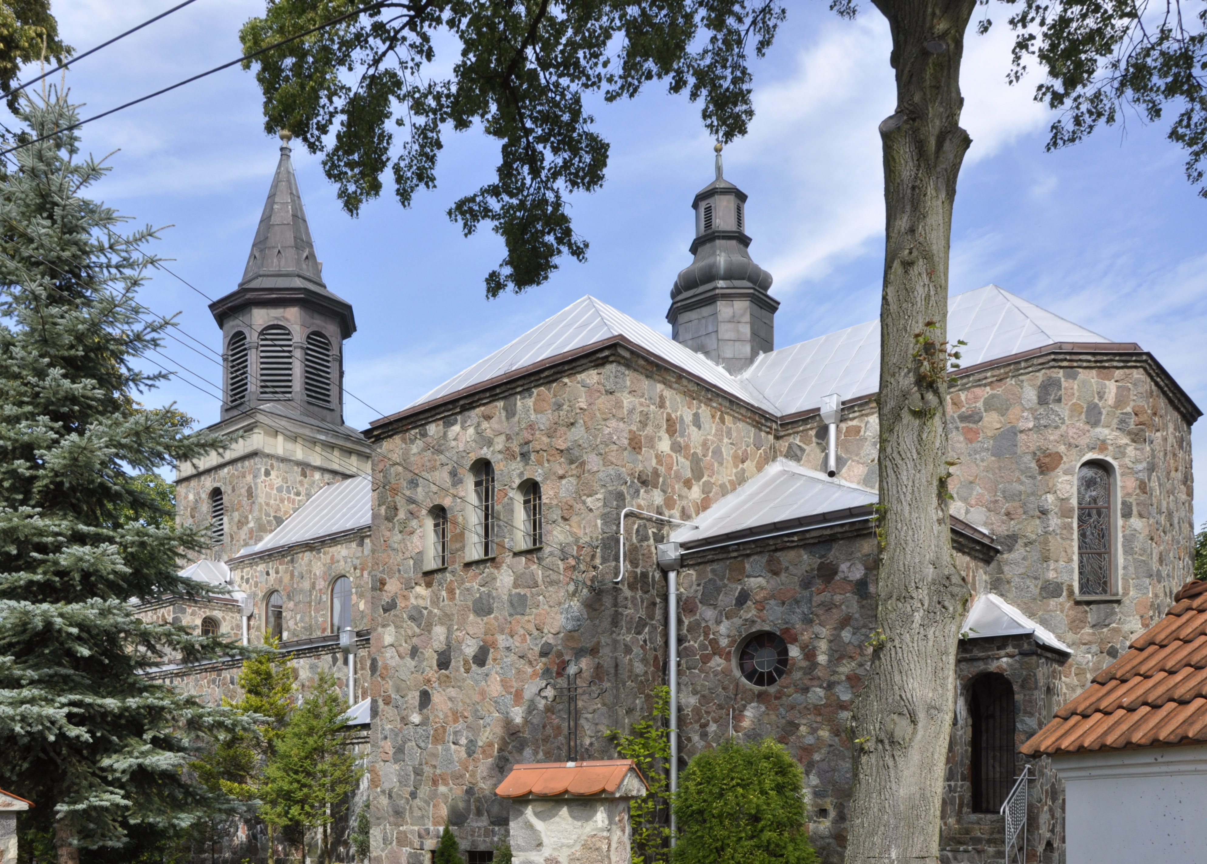 Konary (powiat grójecki), woj. mazowieckie, gmina Warka